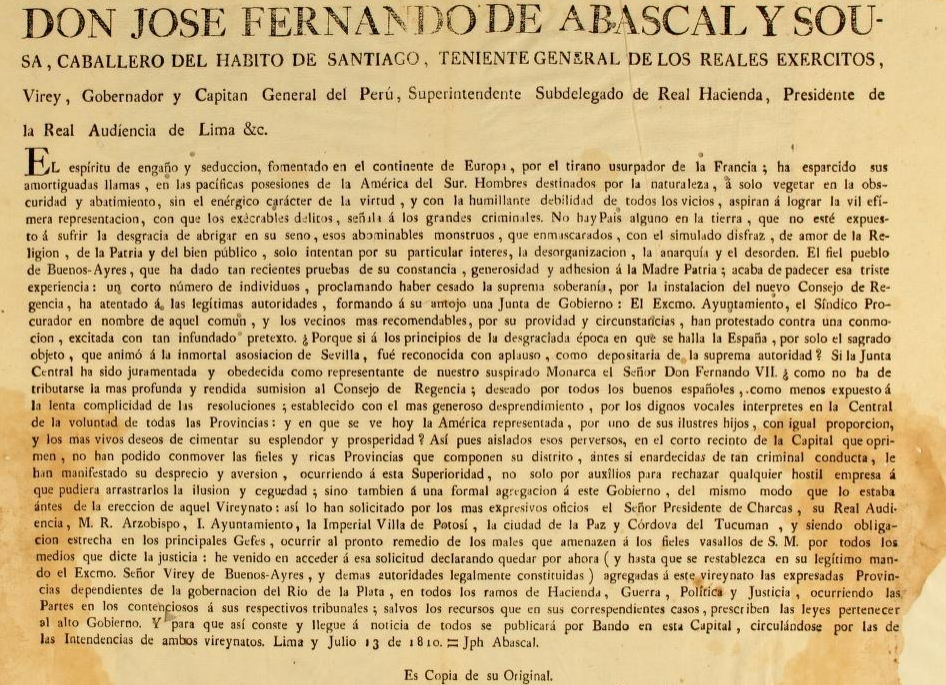 Agregación de la Provincia de Charcas y la intendencia de Córdoba del Tucumán al virreinato del Perú